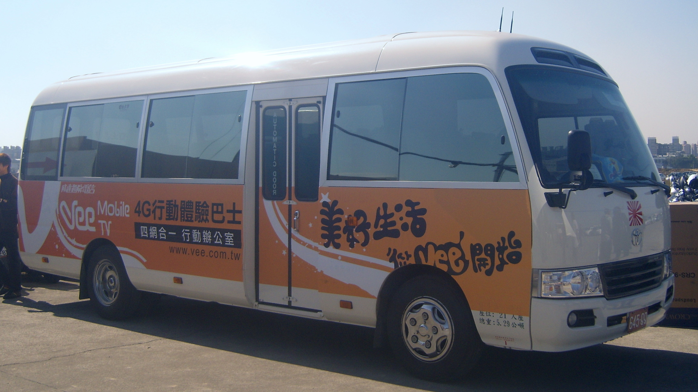 2008 Taichung IT Month: Vee Mobile TV Bus.